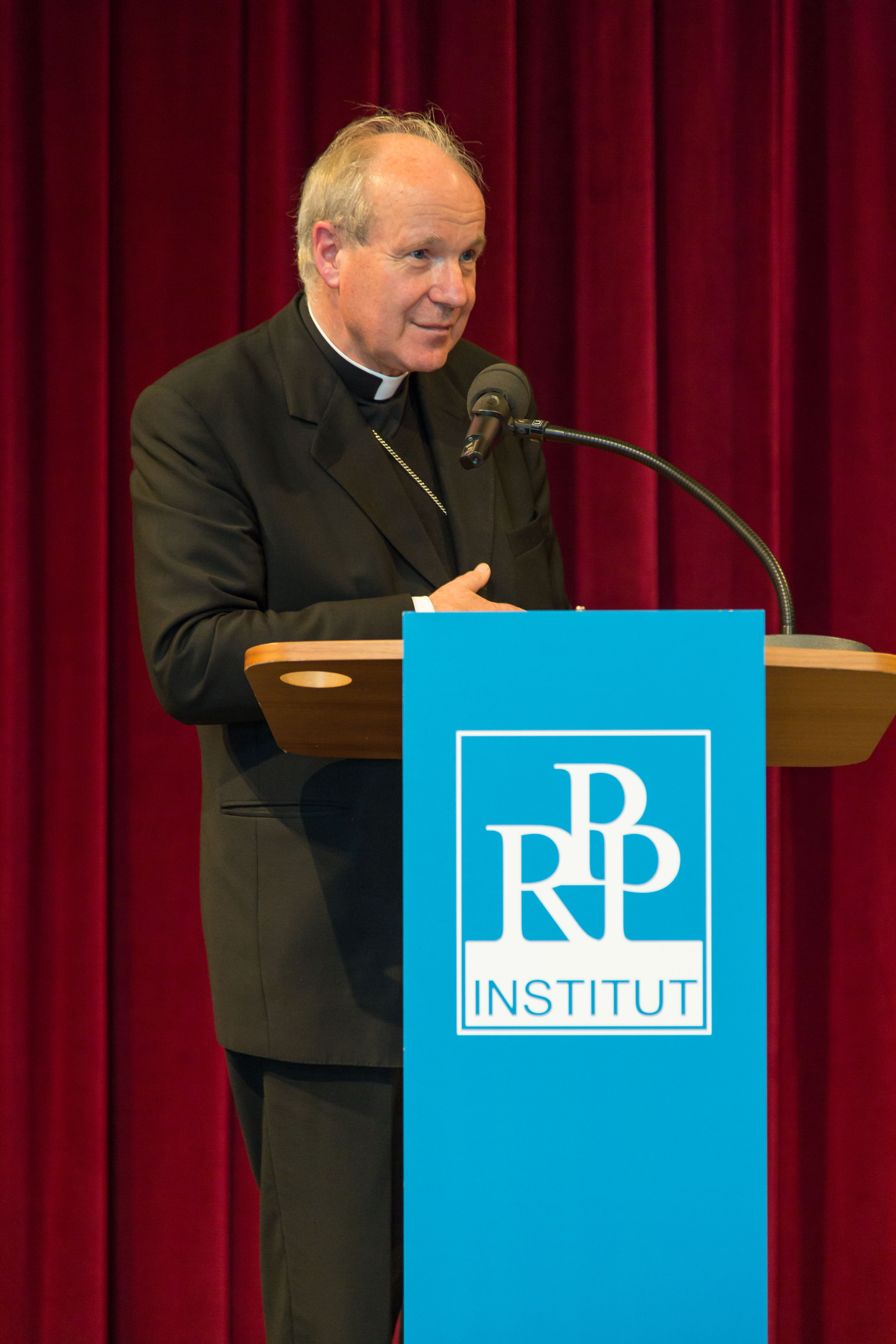 Christoph Schönborn auf der Fachtagung des RPP-Institutes über "Glück und Seligkeit" am 20. April 2013 im Palais Liechtenstein (Fürstengasse)